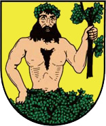 Znak města Město Albrechtice zdroj